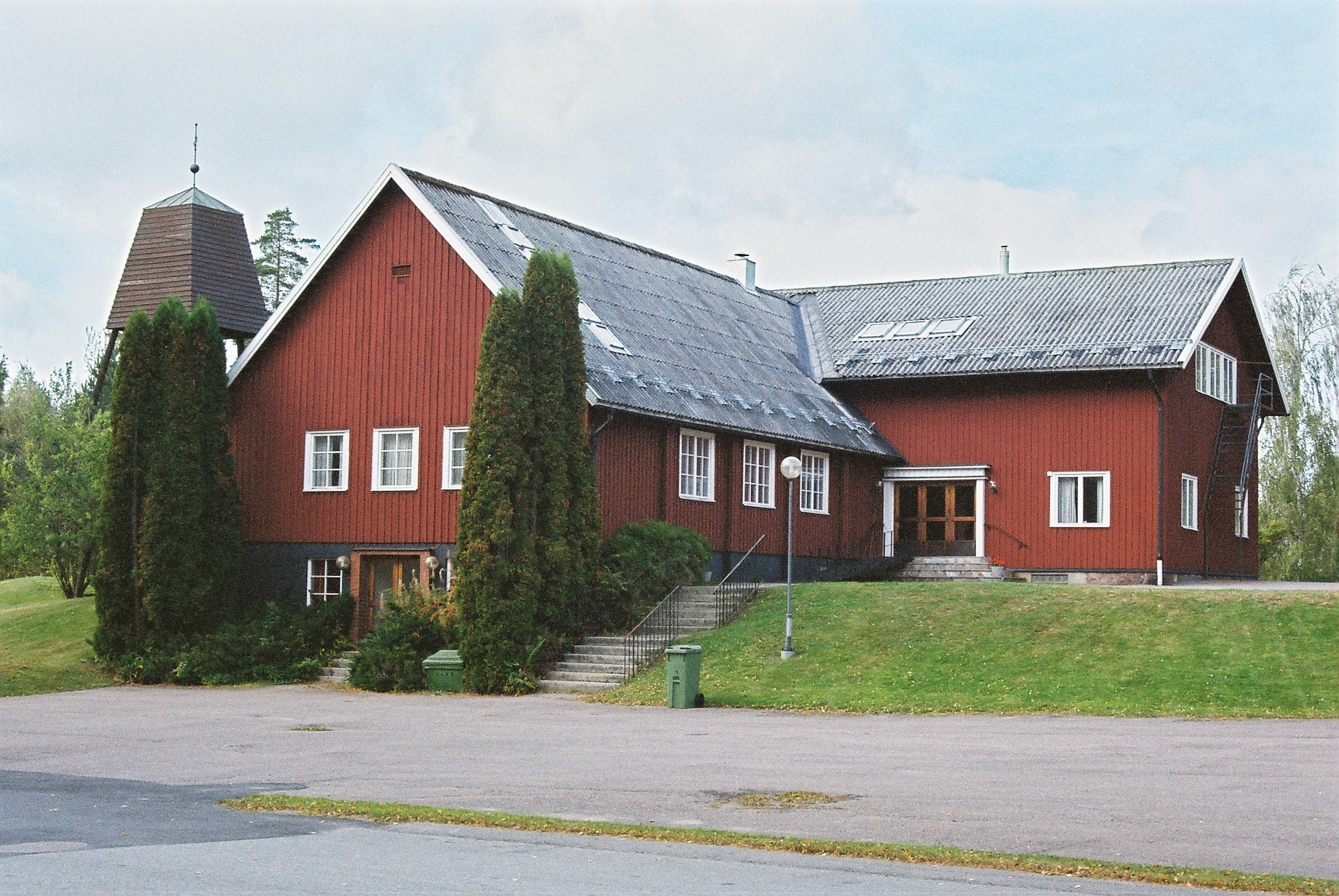 Kyrkobyggnaden...